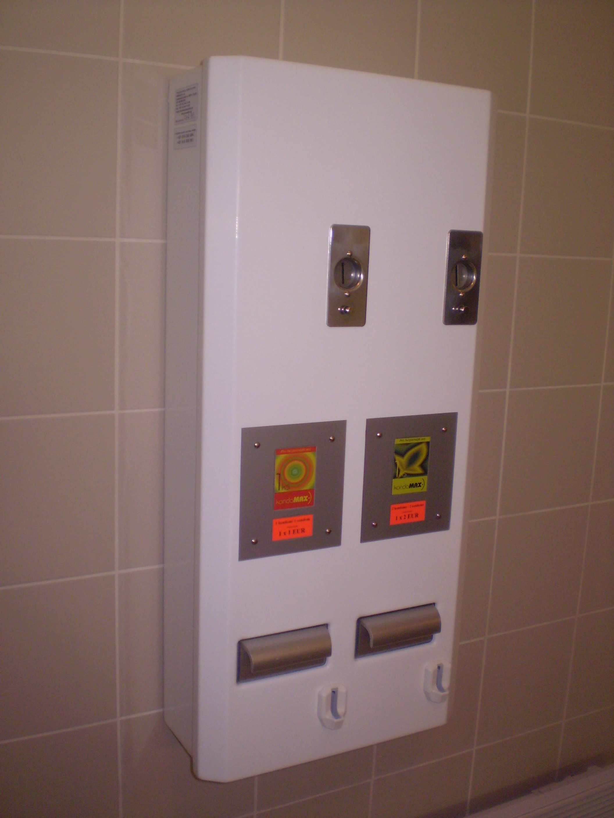 automat na kondómy – SARIKO